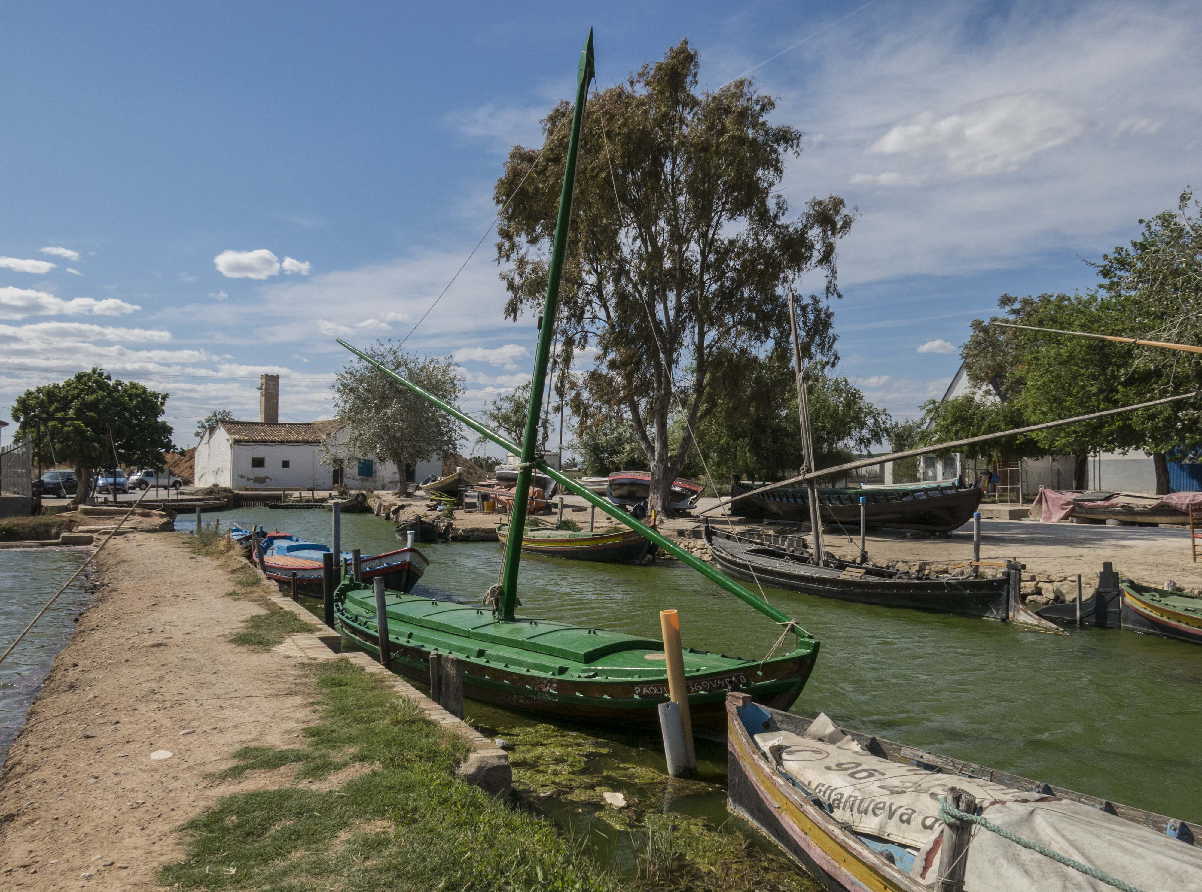 Projecte de col·laboració de l'Arxiu Ismael Latorre Mendoza amb Wikimedia Commons i Amical Wikimedia. El port de Silla està situat al terme de Silla i a 2 quilòmetres de la població, entre l'horta i l'arrossar. Històricament, durant el segle XIII, està acreditada l'activitat pesquera. Al port, a l'època del rei Jaume hi havia unes 60 embarcacions de pesca.